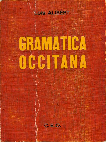 Couverture de la Gramatica occitana de Louis Alibert.